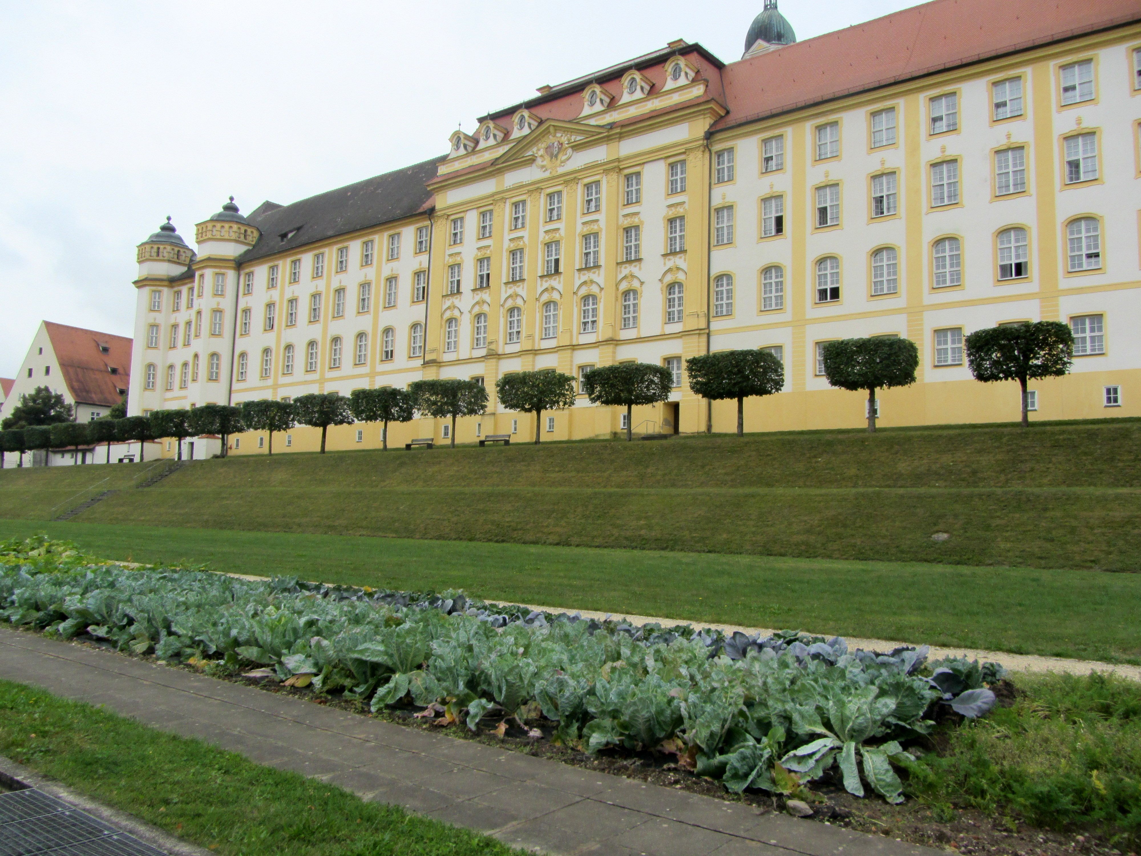 Reichsabtei Ochsenhausen